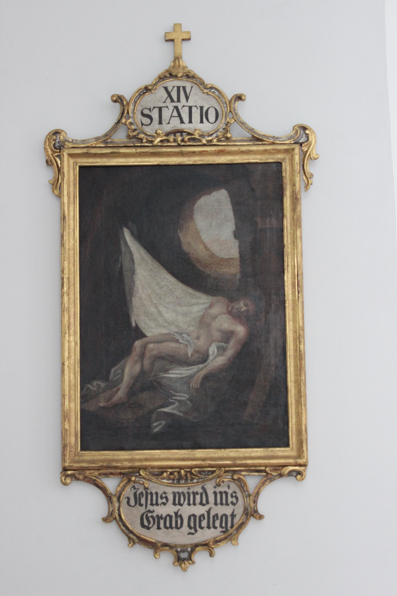 14. Station des Kreuzwegs der Heidelberger Jesuitenkirche